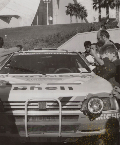 Coureur automobile